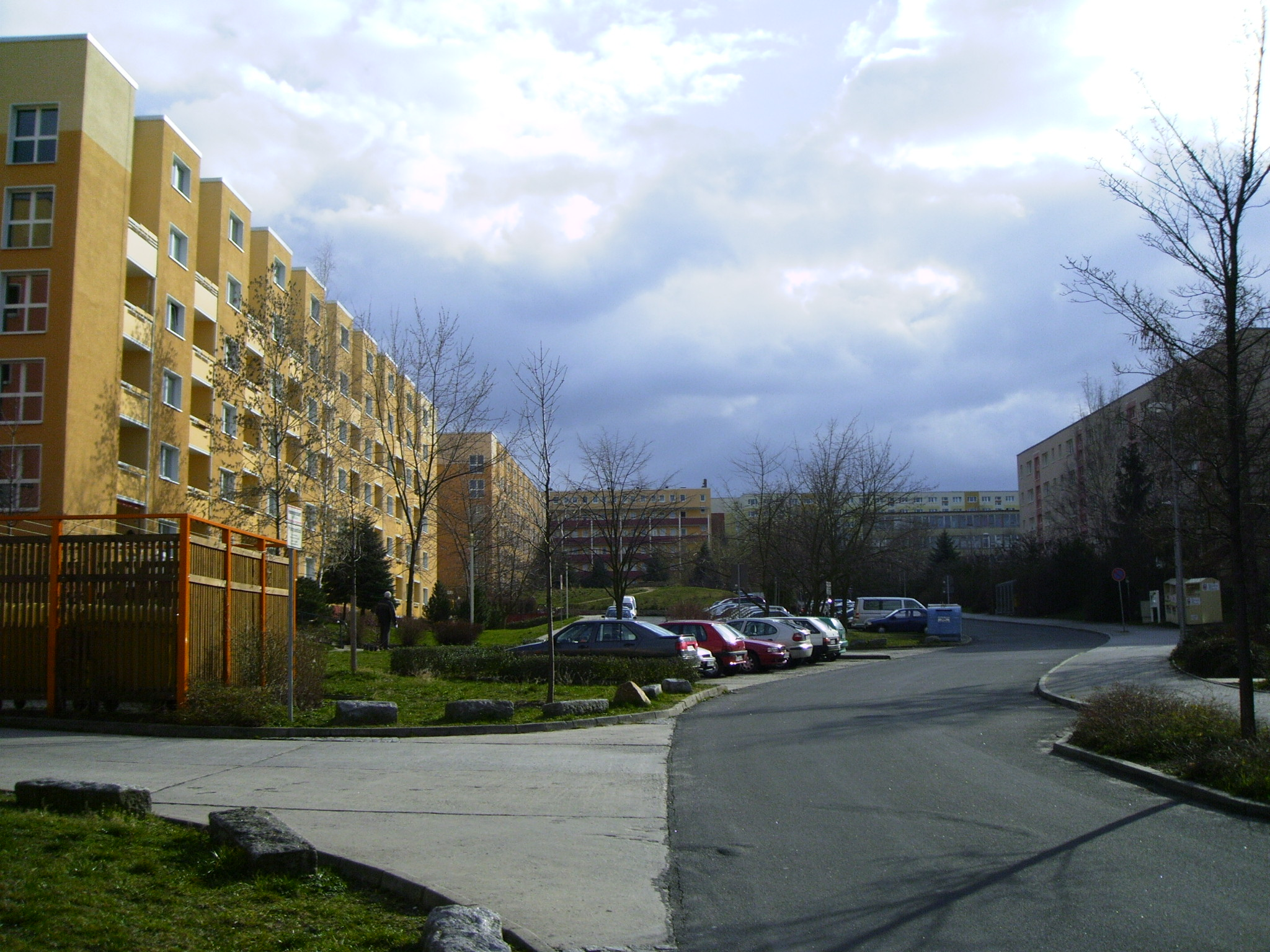 Houses of Bautzens district "Gesundbrunnen".